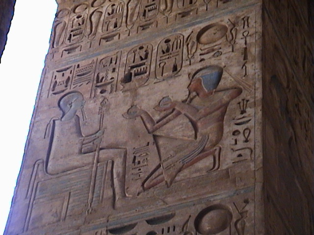 Ramsès III faisant l'offrande des vases nou au dieu Ptah. Temple funéraire de Ramsès III à Médinet Habou - XXe dynastie égyptienne.